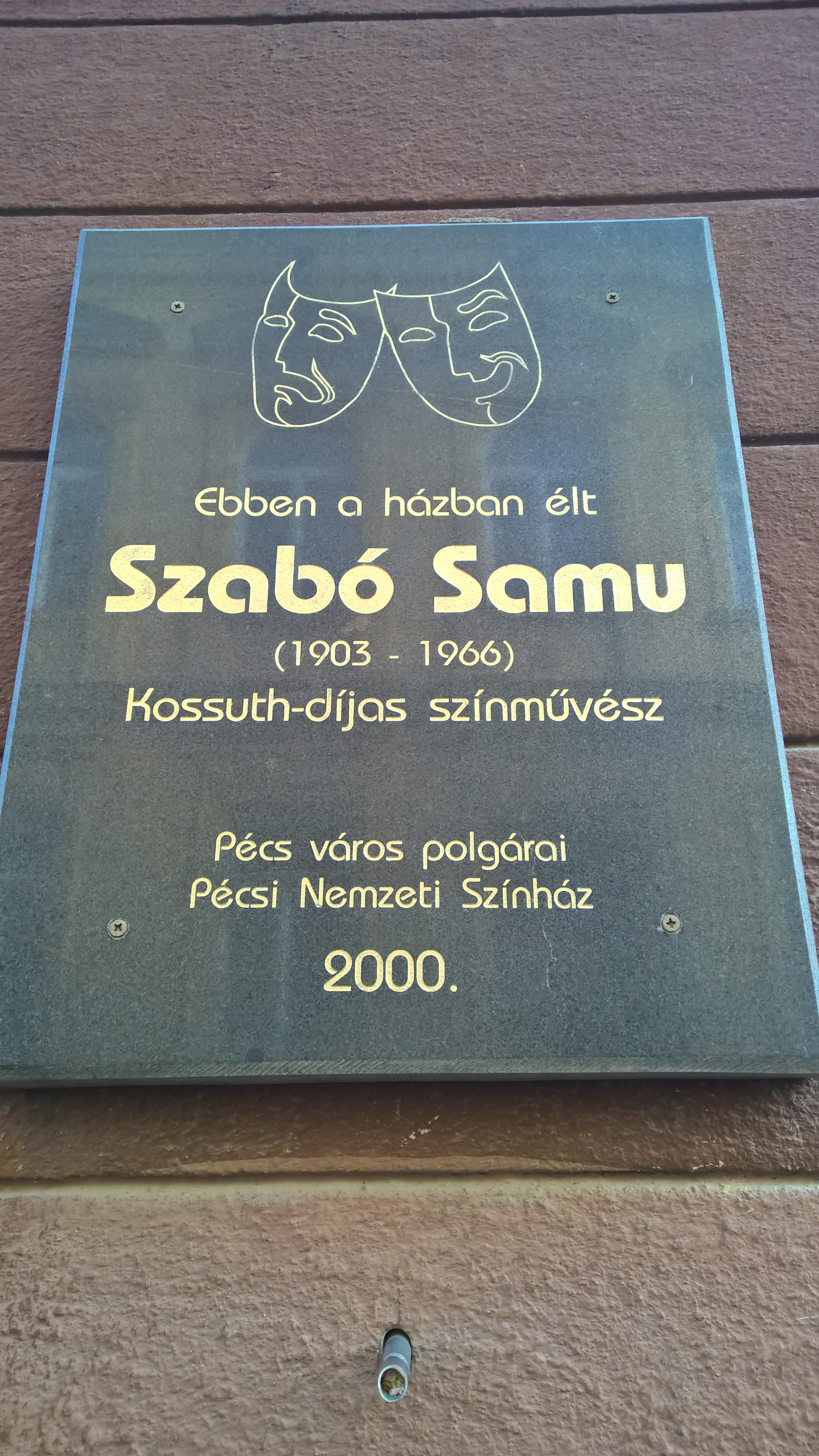 Szabó Samu emléktáblája Pécsett az Anna utca 18-as számú ház falán.